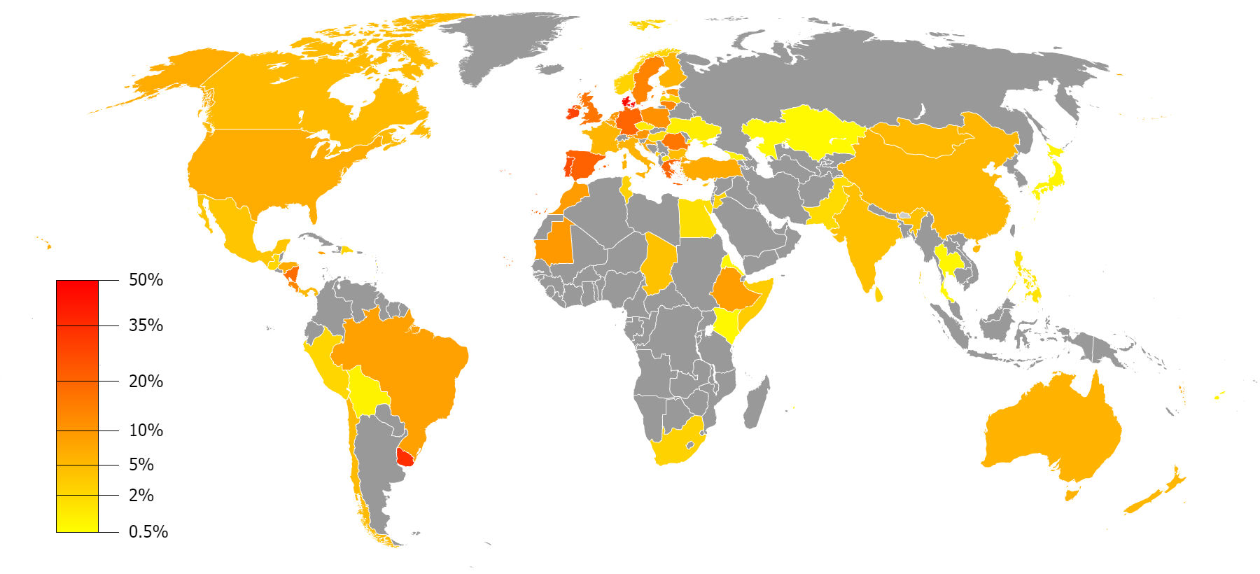 države poredane prema udjelu energije vjetra u ukupnoj potrošnji energije